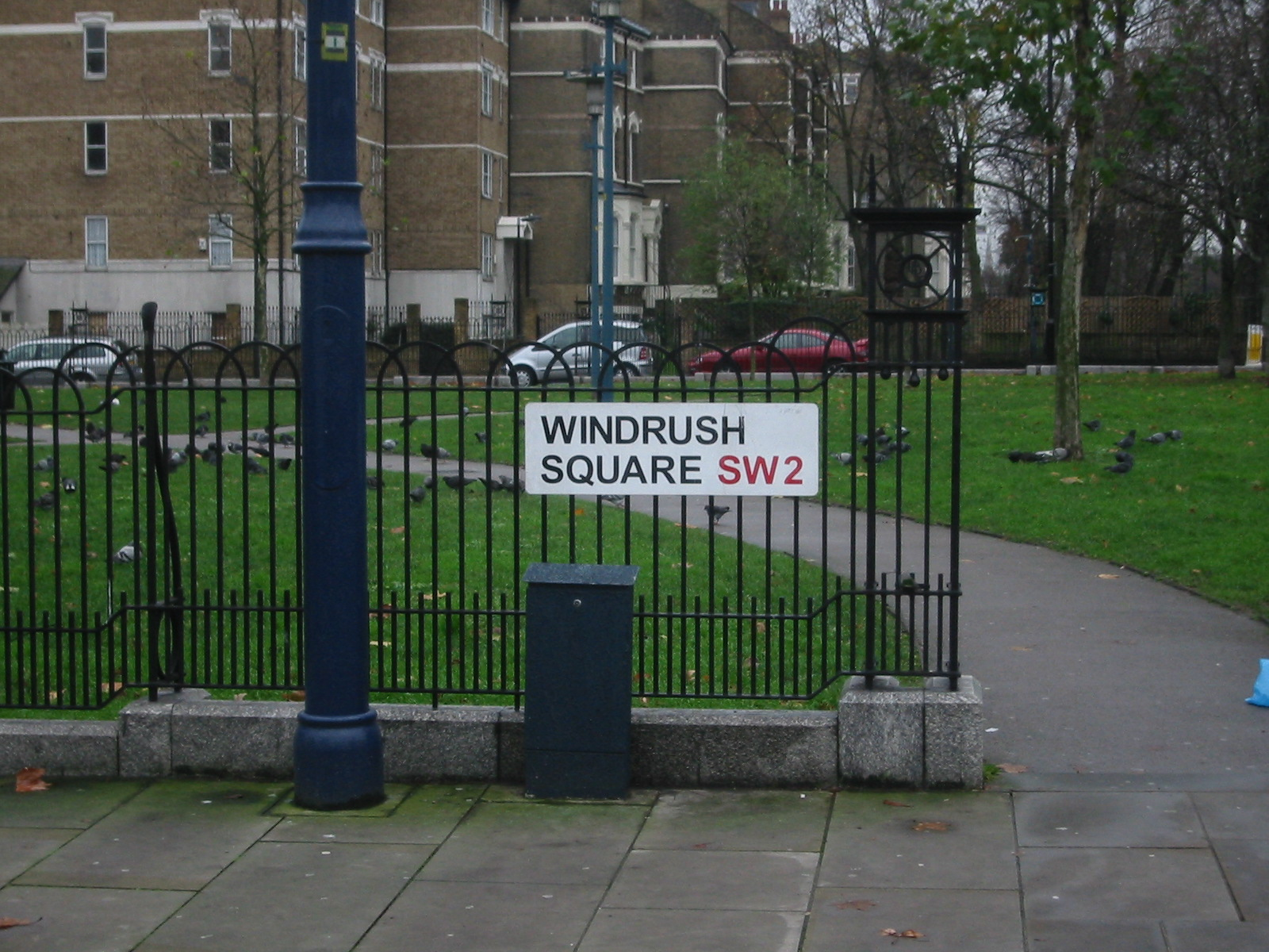 Photo taken by me